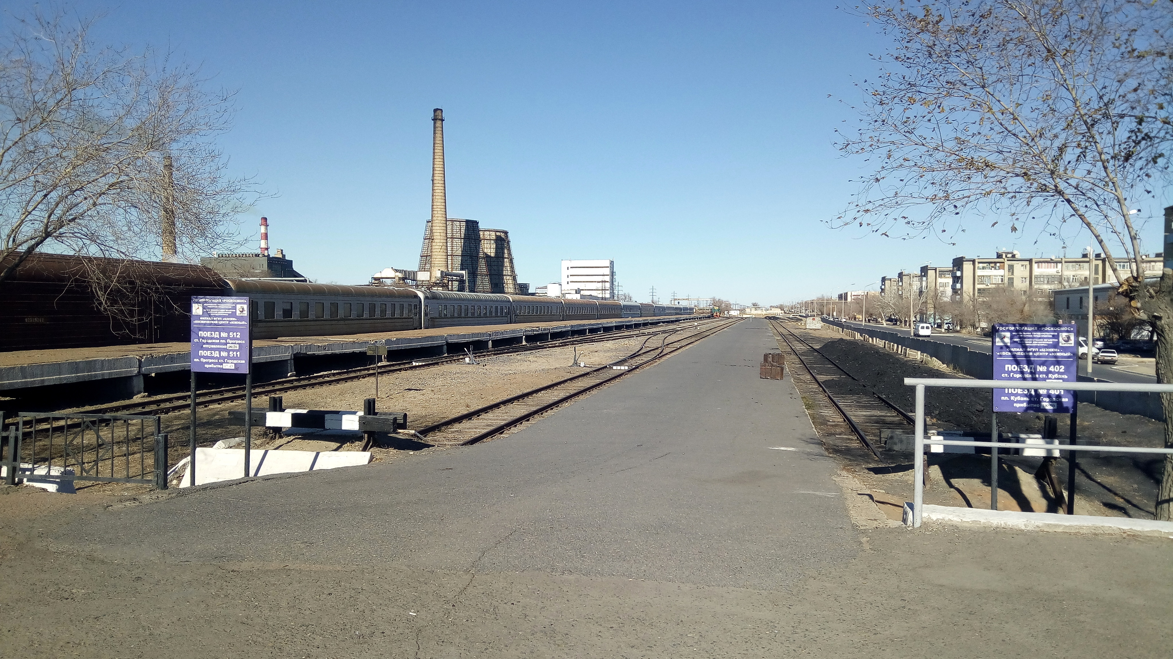 Станция «Городская» (Байконур)